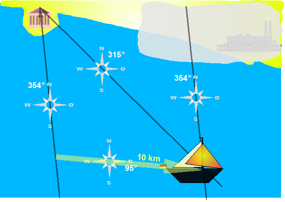 Vorwärts einschneiden